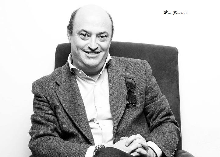 Imagem do escritor Eric Frattini